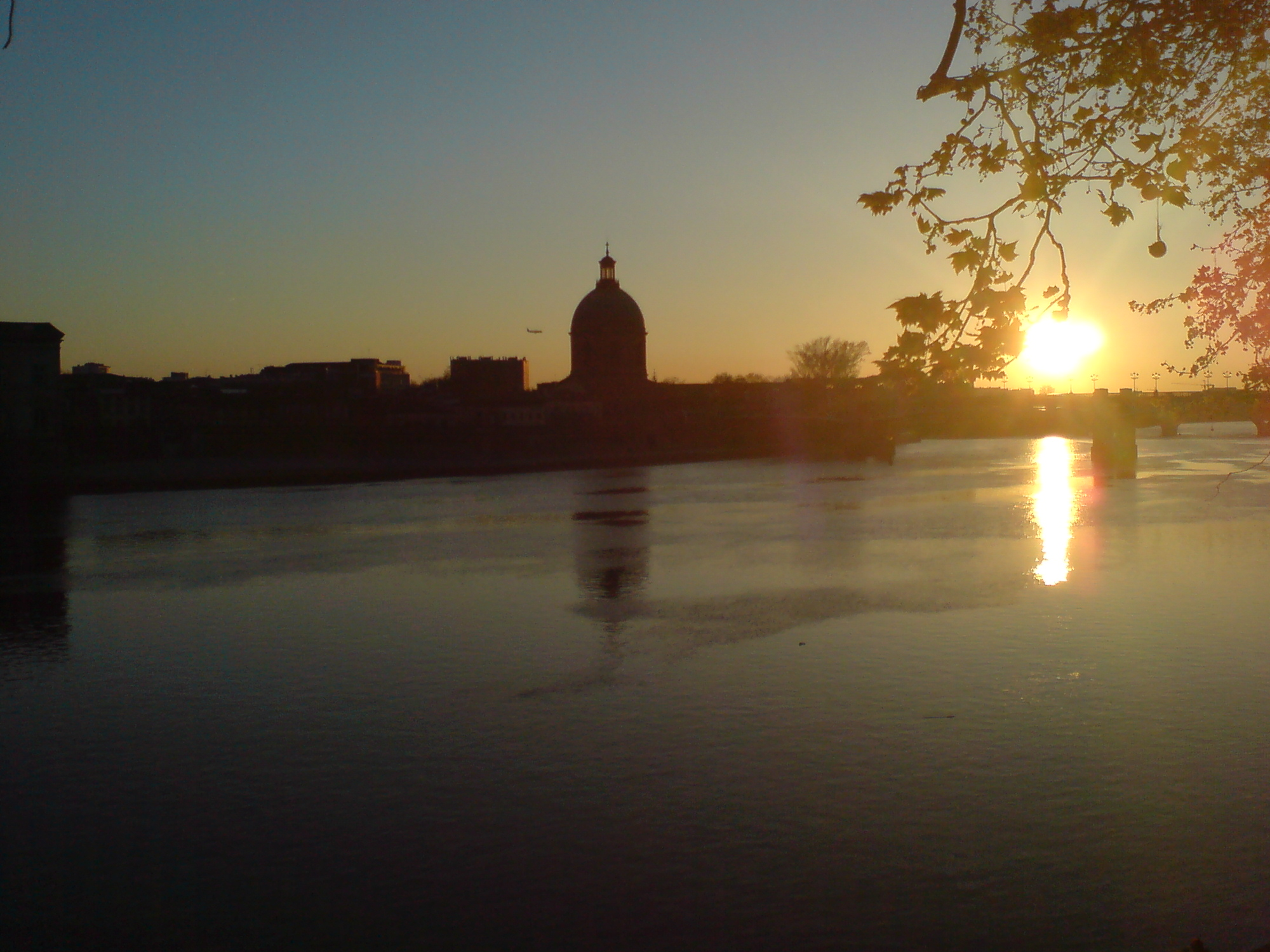 Coucher de soleil sur l'hôpital Saint-Joseph de la Grave de Toulouse.